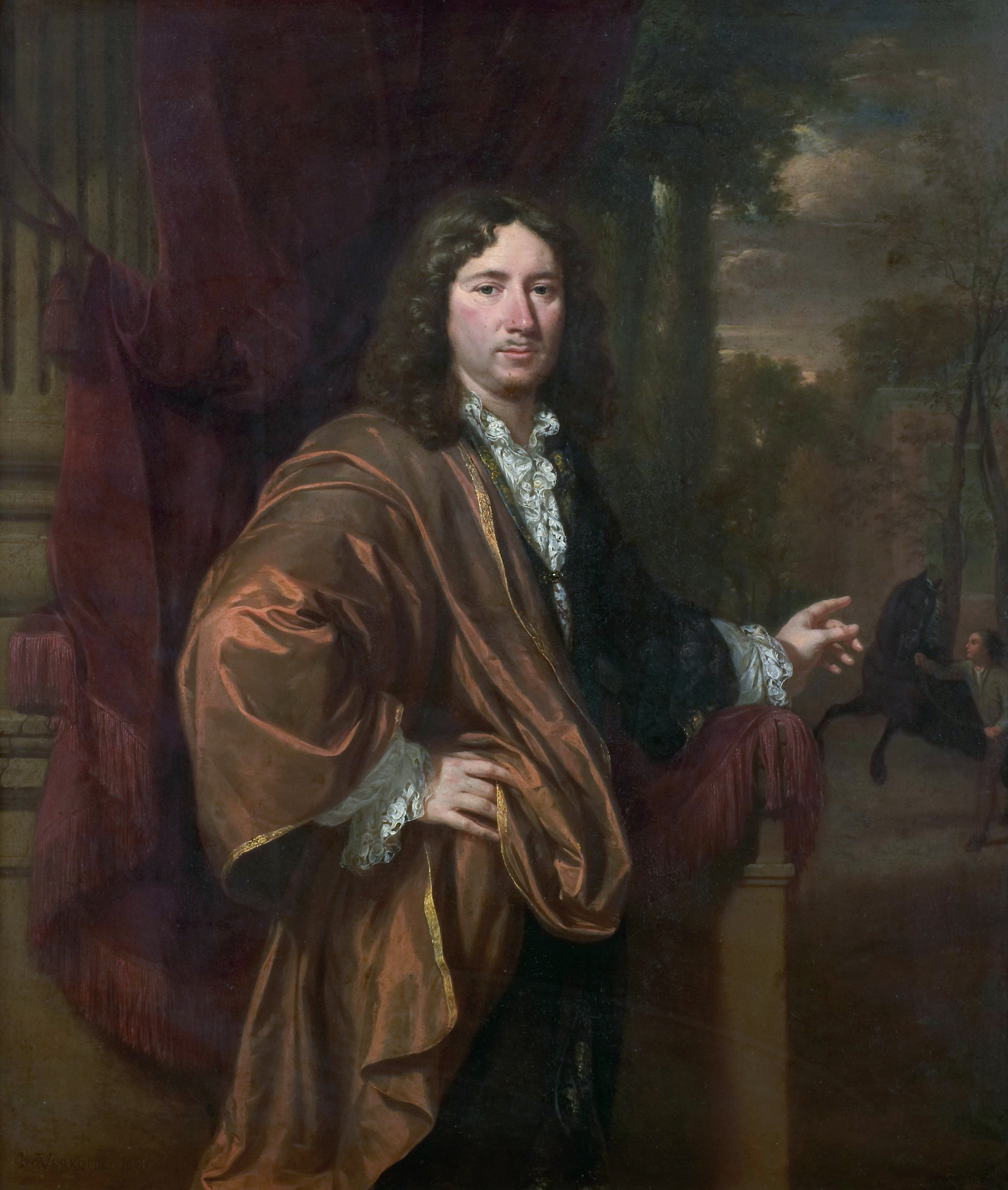 Pendant of File:Jan Verkolje (I) 004.jpg